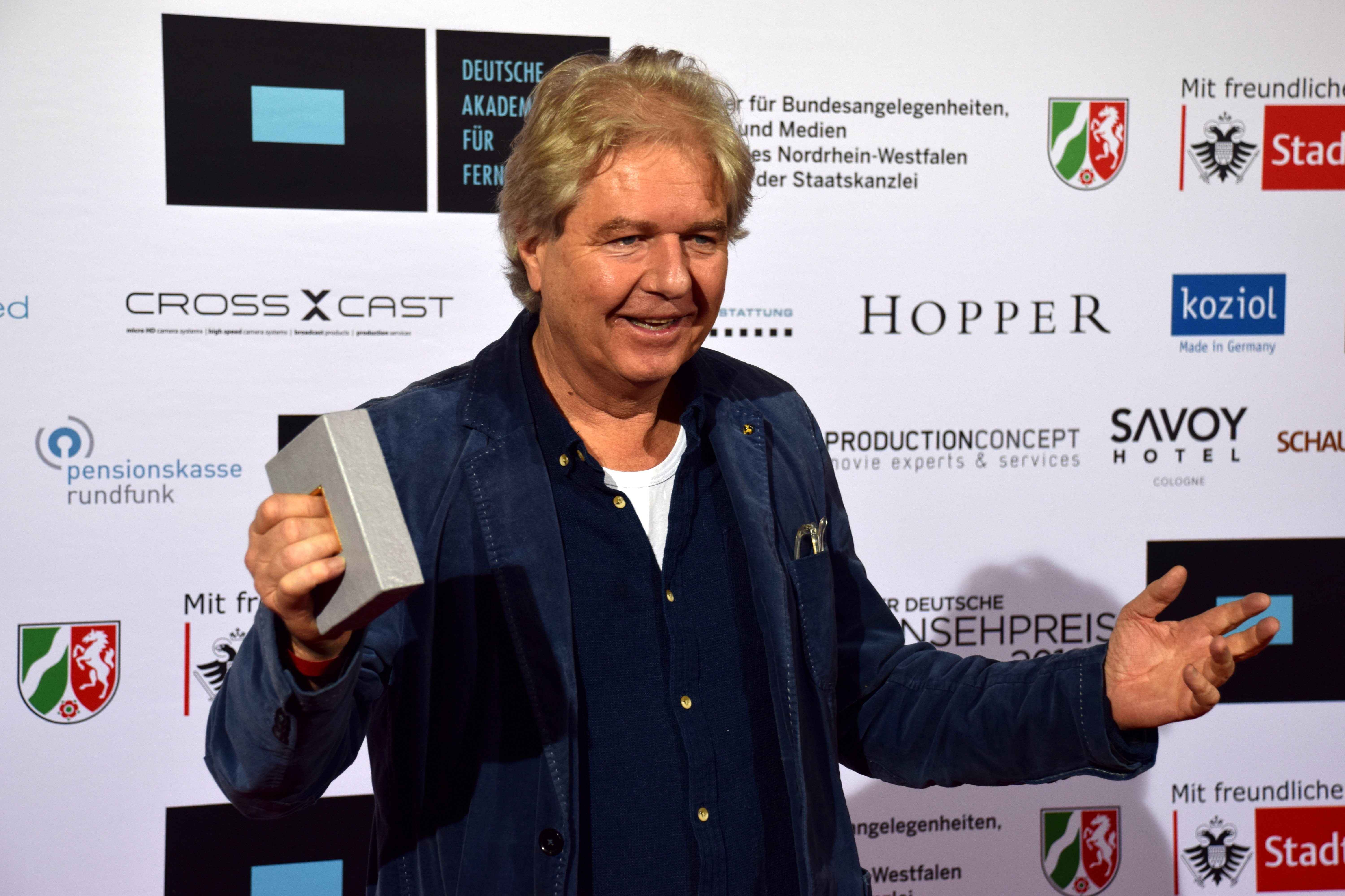 Michael Eckelt (Produzent) Deutsche Akademie für Fernsehen - Symposium und Preisverleihung 2015 in Köln